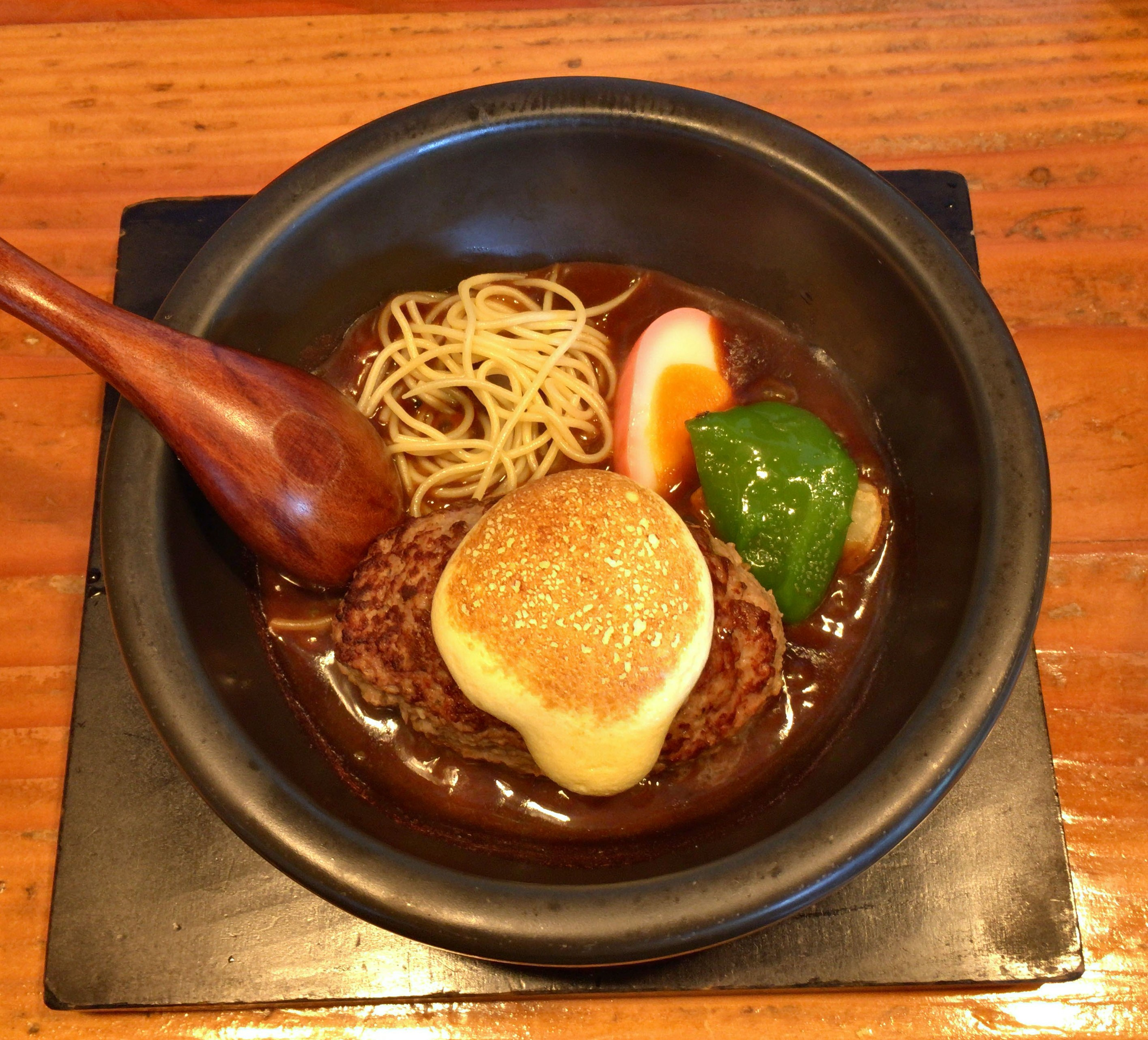 山本のハンバーグの看板メニュー「山本のハンバーグ」。ハンバーグの上に乗っているのはチーズ。